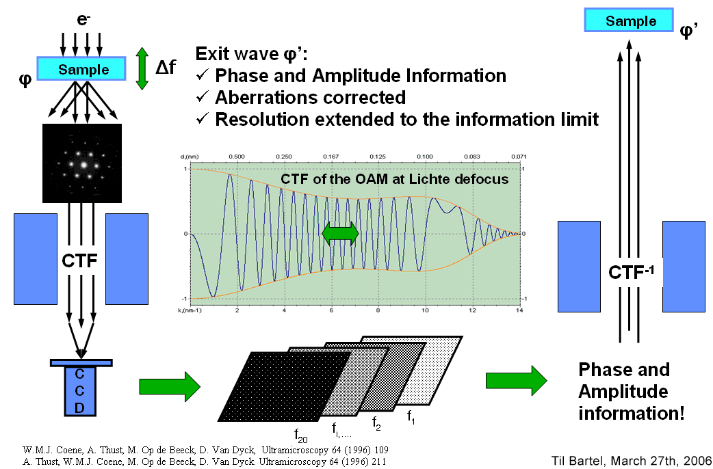 (links) Die Elektronenwelle verlässt die Probe und wird durch das Mikroskop bis zur Bildebene geleitet. (unten) Der Fokus wird schrittweise geändert und eine Serie von Bildern wird aufgenommen. Das Interferenzmuster der Bilder ändert sich entsprechend der CTF und erlaubt Phasenbestimmung der Bildwelle. (rechts) Die Welle wird zur Probe zurück propagiert und die exit-Welle wird wiederhergestellt.